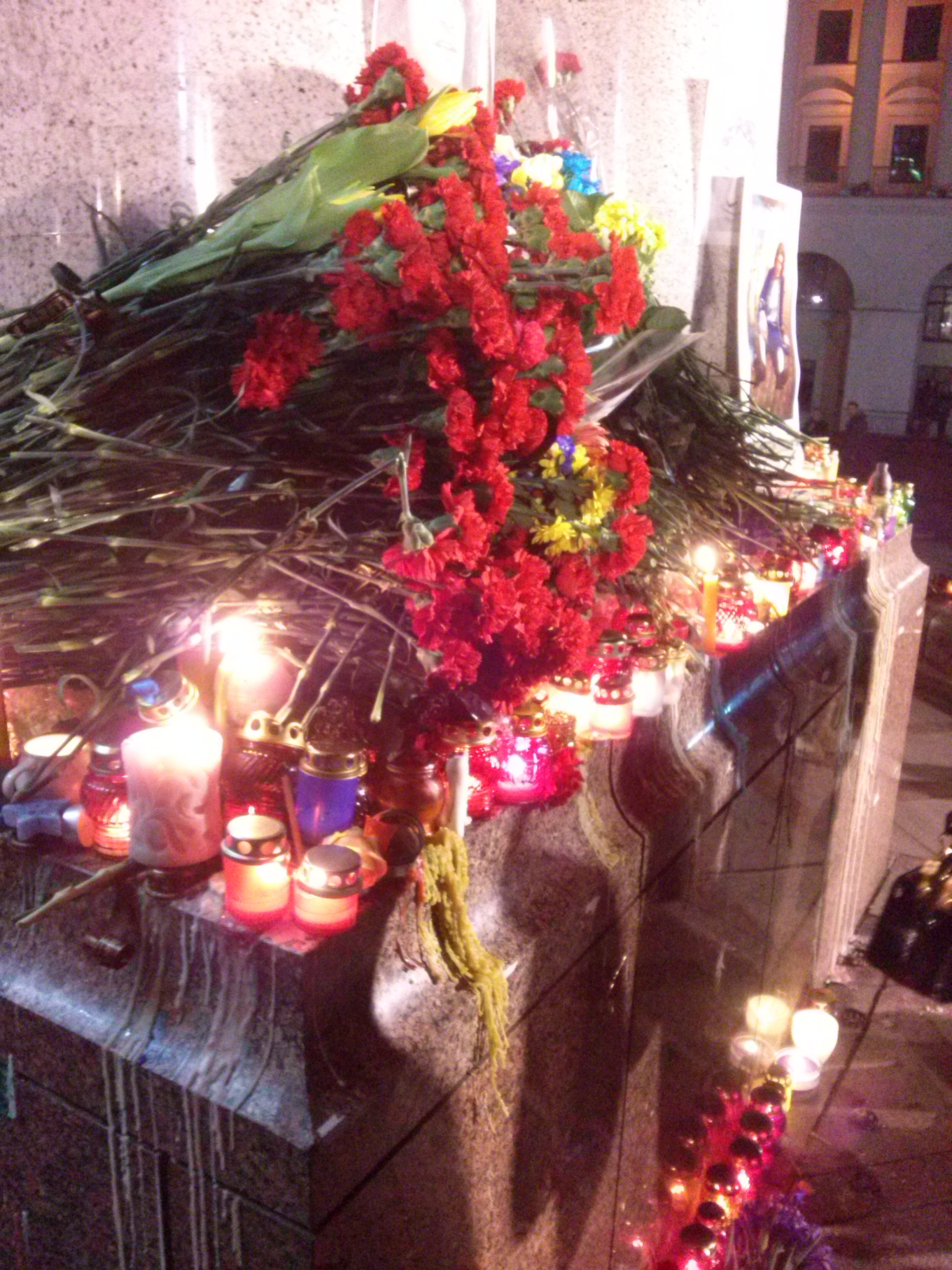 Ушанування пам'яті Андрія Кузьменка на Майдані Незалежності в Києві. 2.02.2015